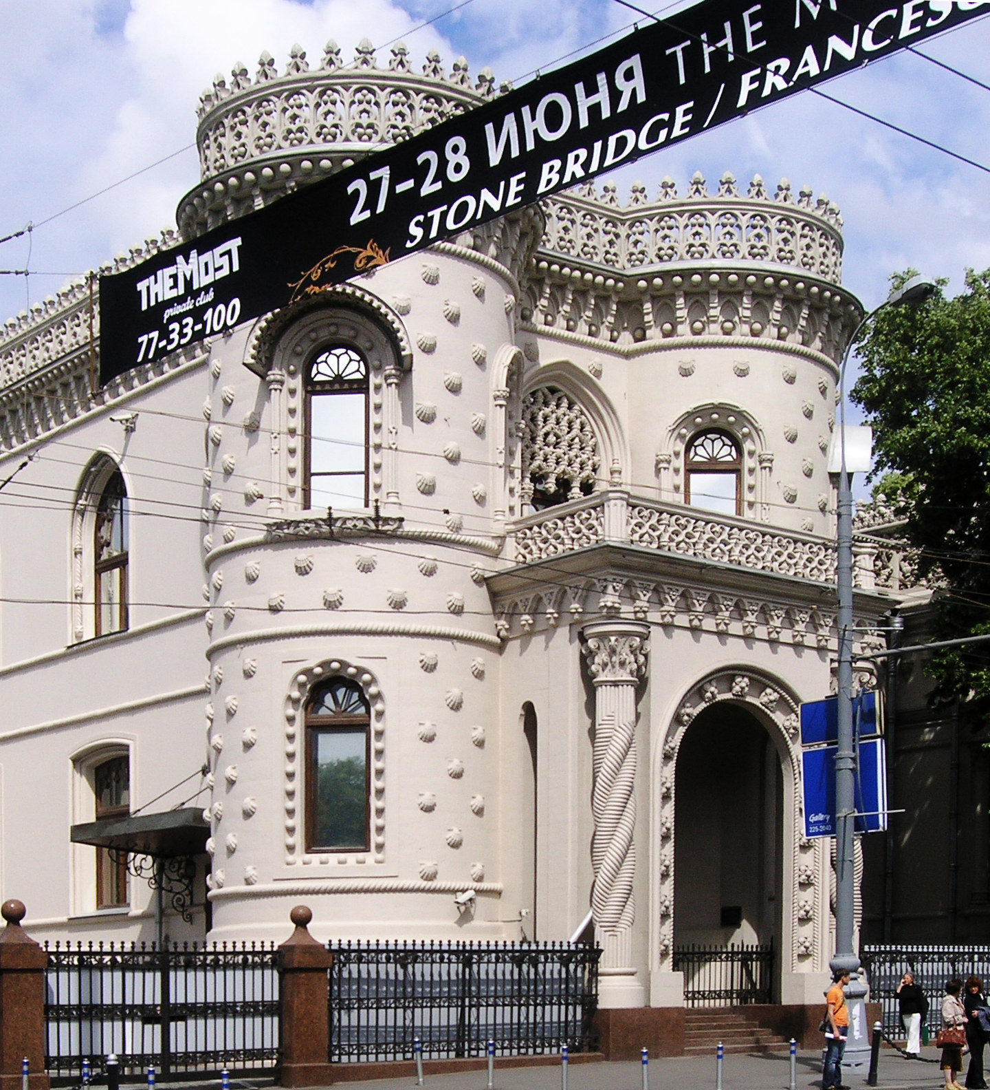 Особняк Арсения Морозова